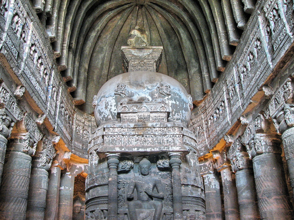 Inside an Ajanta Cave, Maharashtra, India